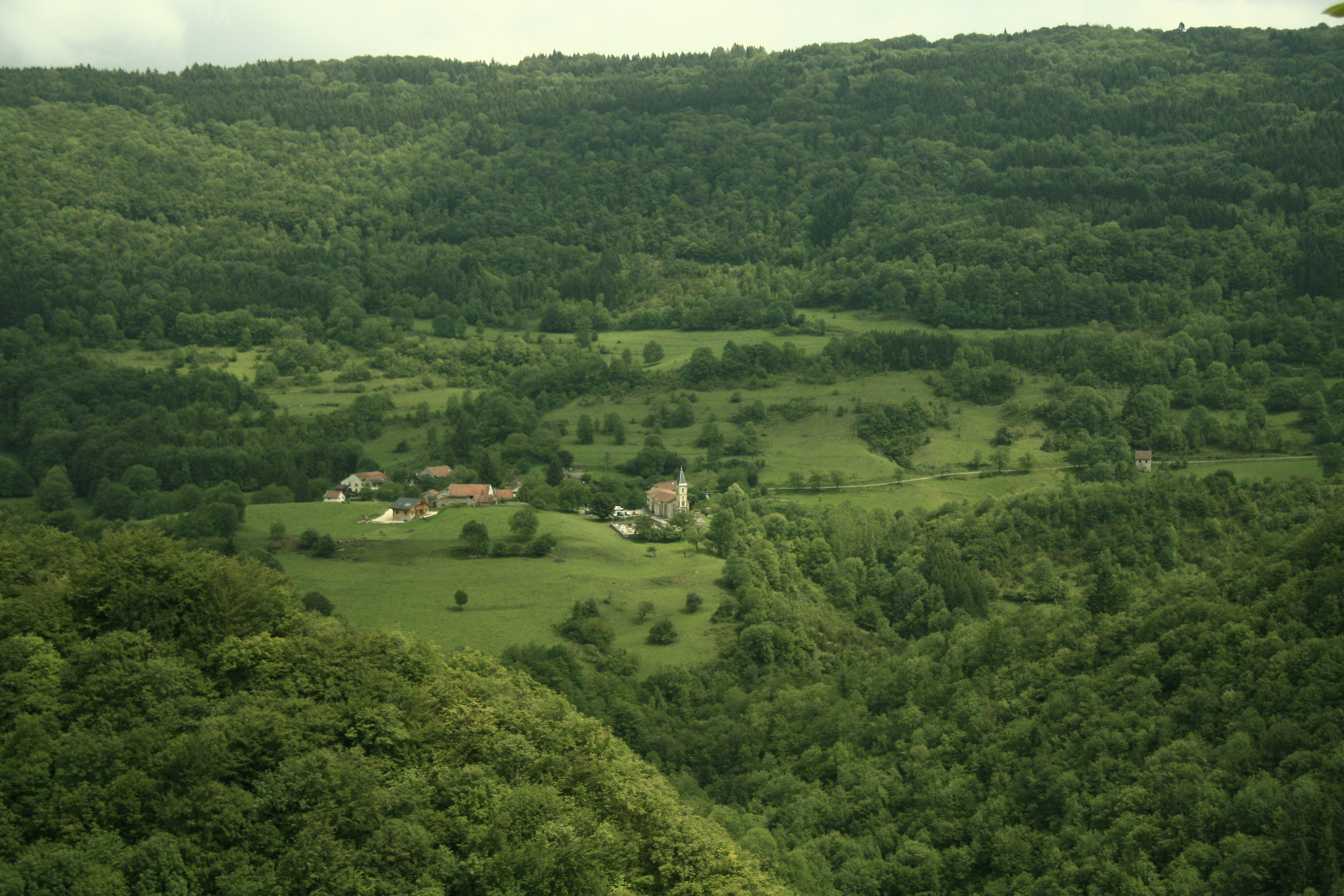 Hameau Les Pézières vu du chateau de Montgriffon